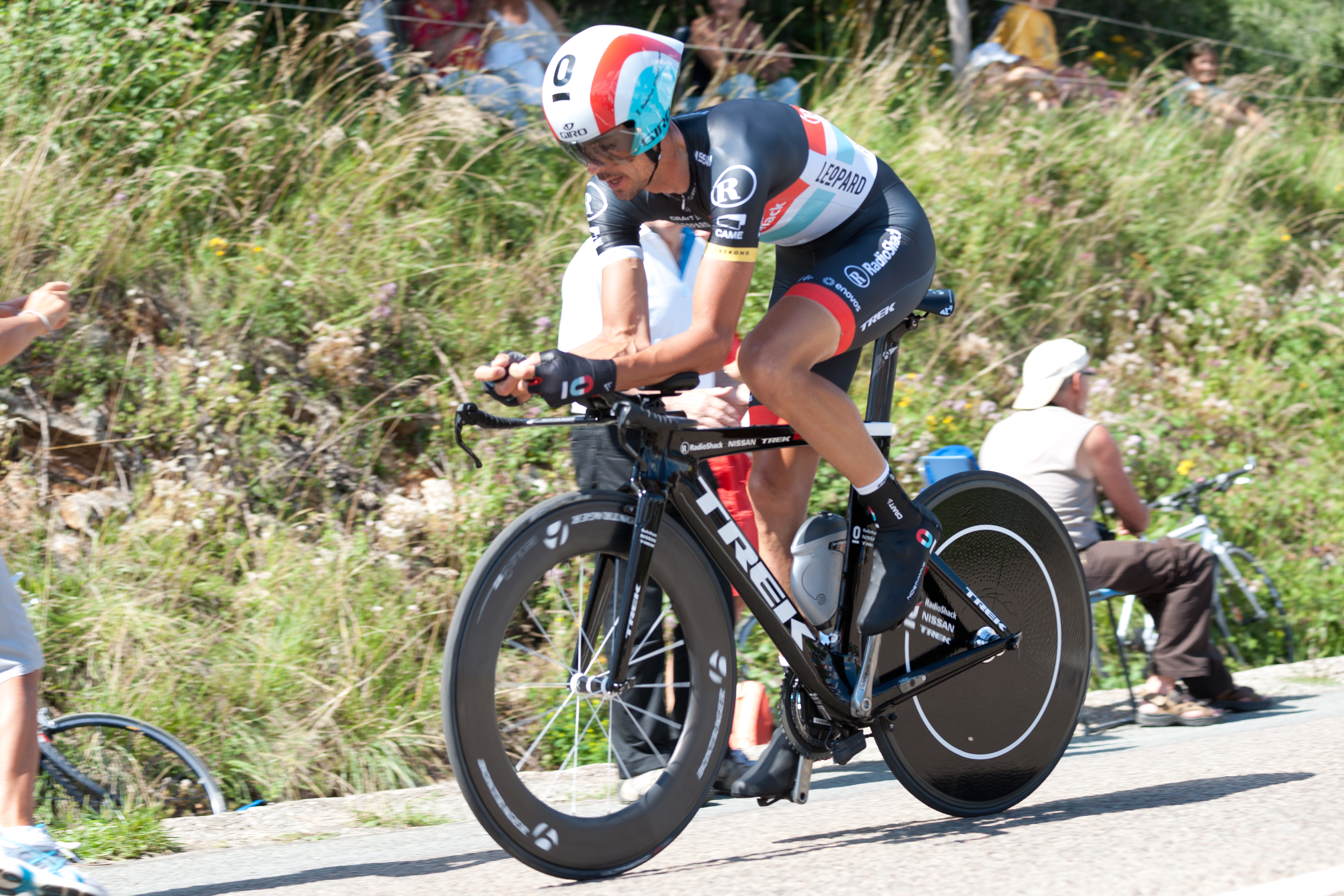 Andreas Kloden - TDF 2012